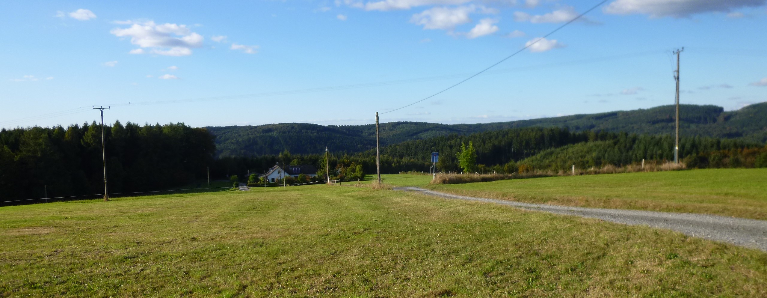 Rottland